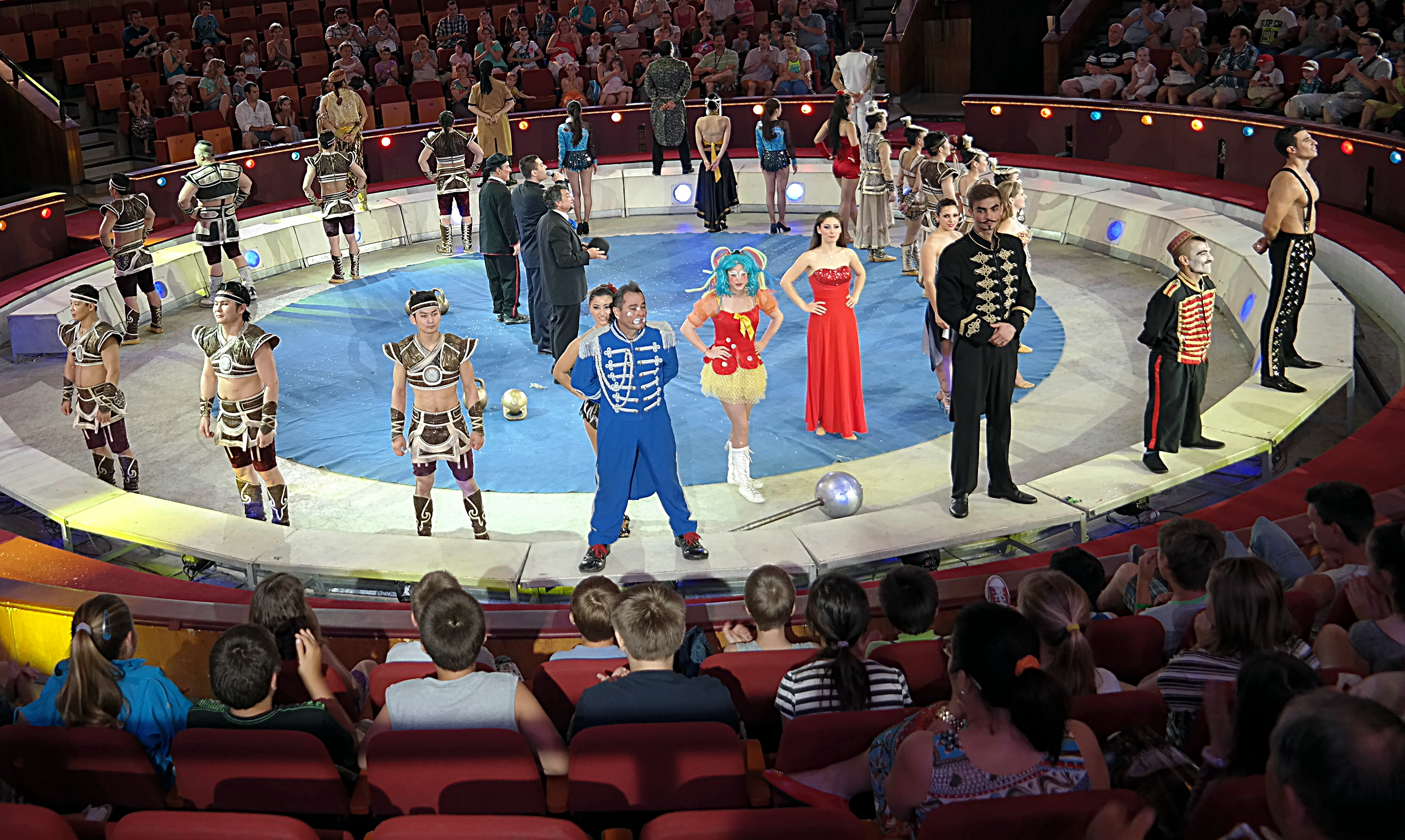 Circus Maximus finálé. Fővárosi Nagycirkusz.